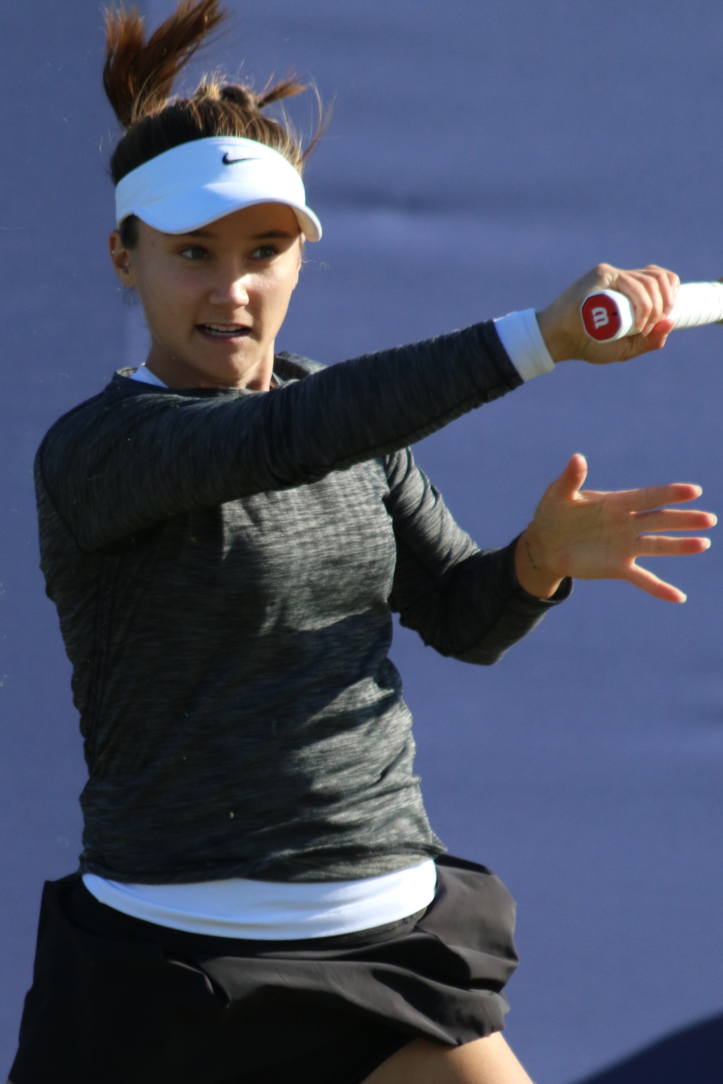 Davis EBN17 (7)